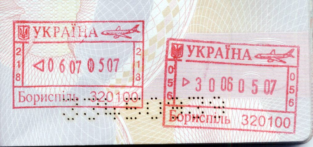 Passport stamp from Ukraine - Kiev Airport